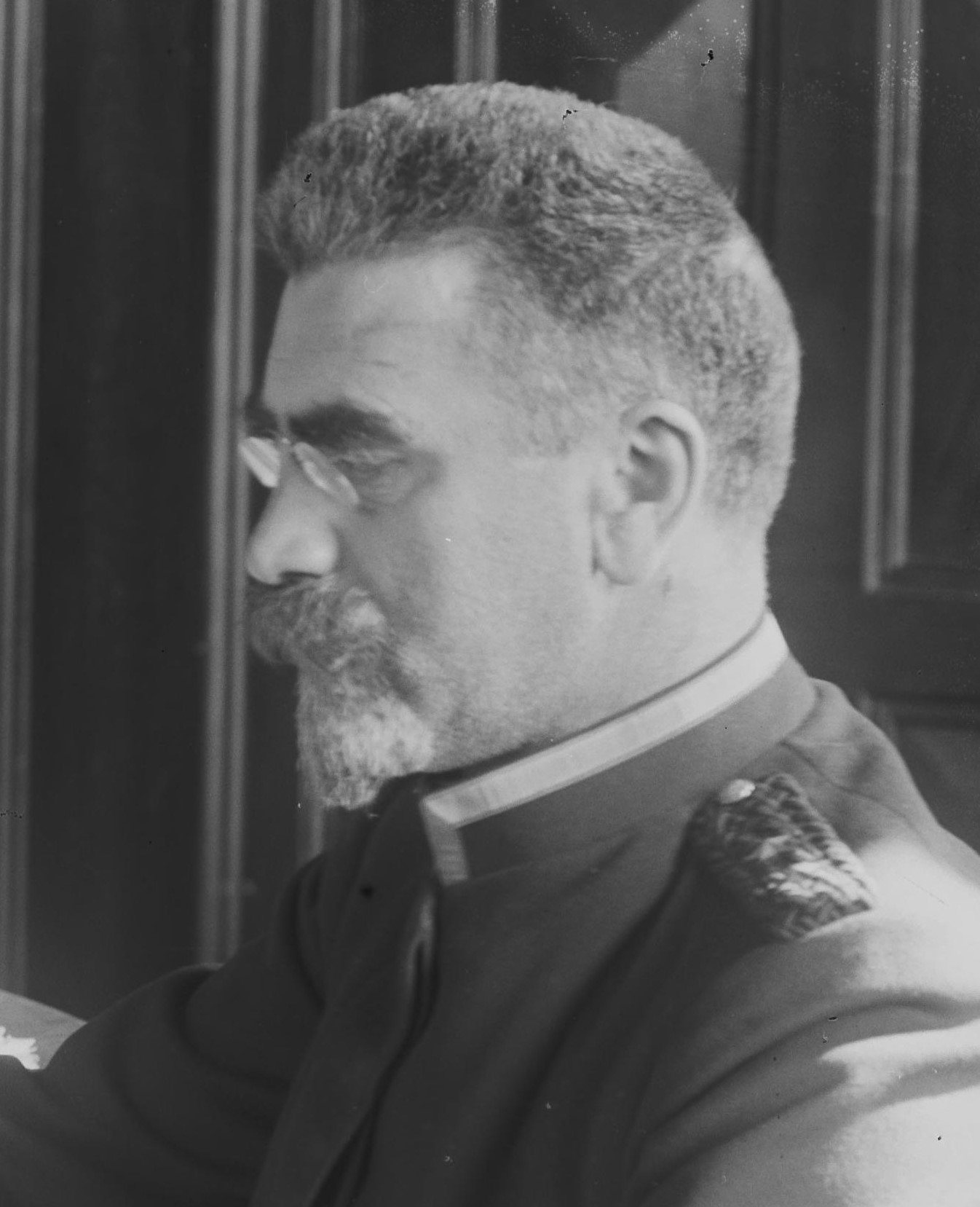 Bildet er hentet fra Nasjonalbibliotekets bildesamling. Anmerkninger til bildet var: Påskrift arkivark: Paschef Eriksen Arkivnummer: 237